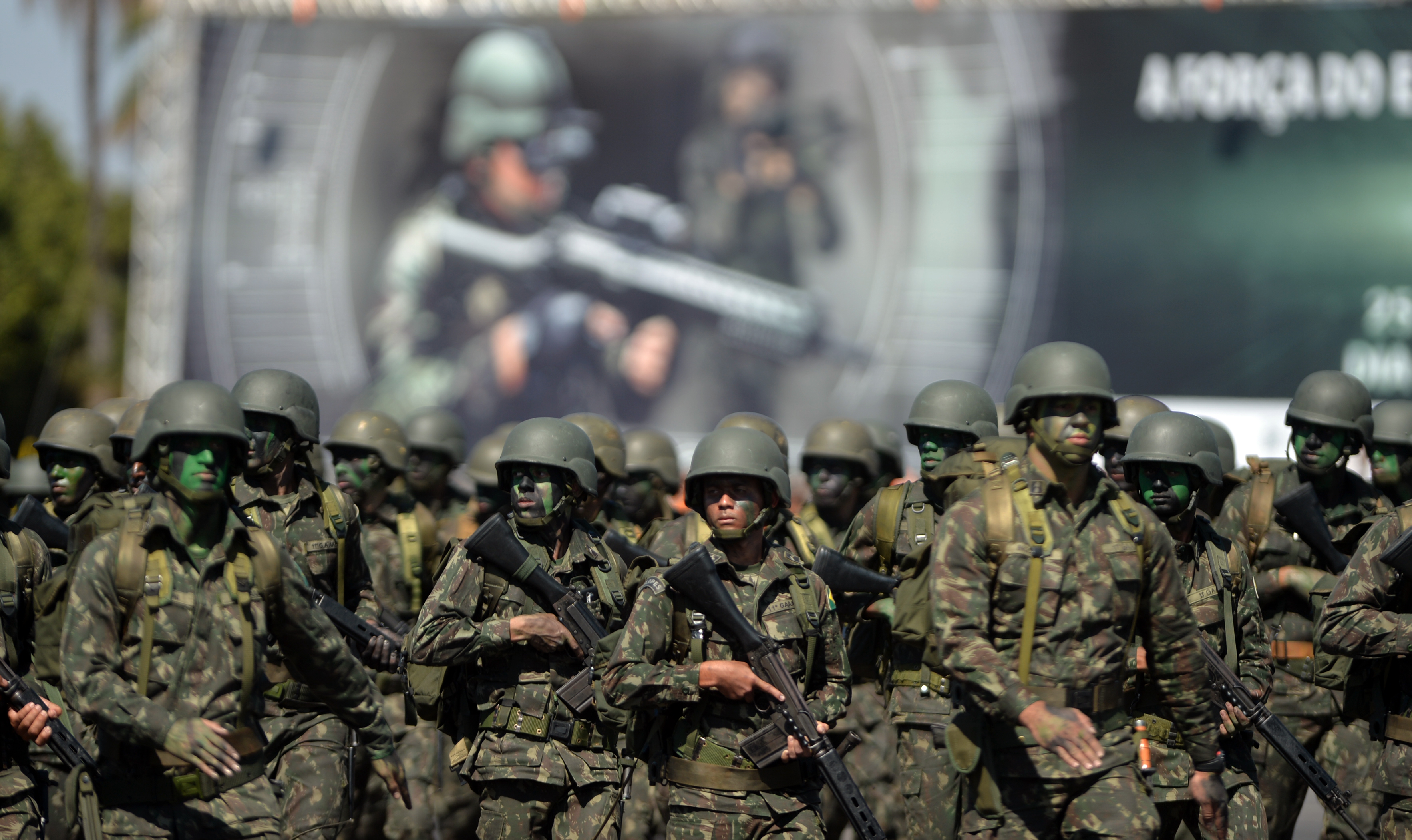 25/08/2015, Brasília - DF Fotos: Tereza Sobreira